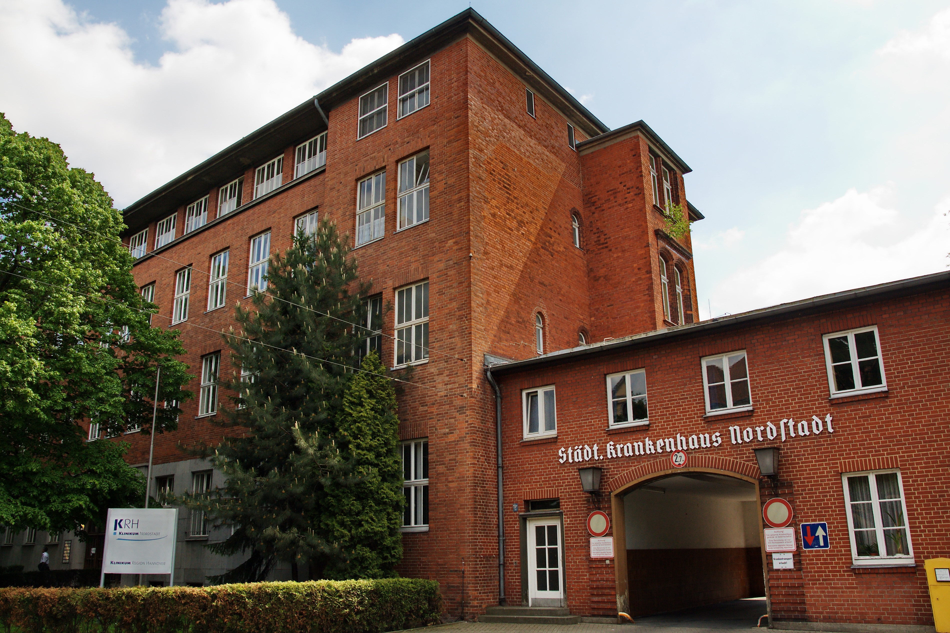 Baudenkmal Haltenhoffstraße 46 (Nordstadtkrankenhaus) in der Nordstadt Hannover, Niedersachsen, Deutschland